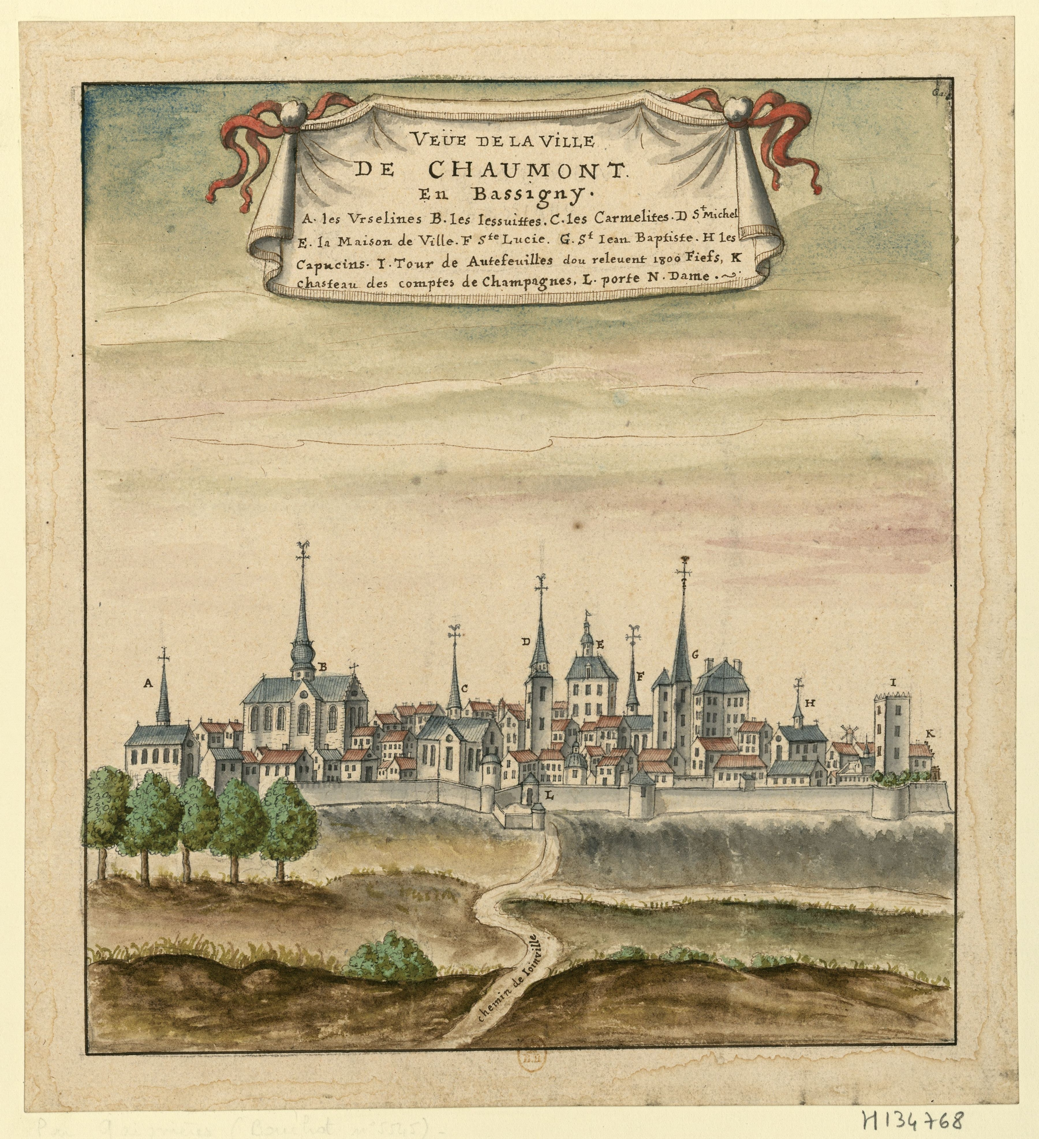 Veüe de la ville de Chaumont, en Bassigny